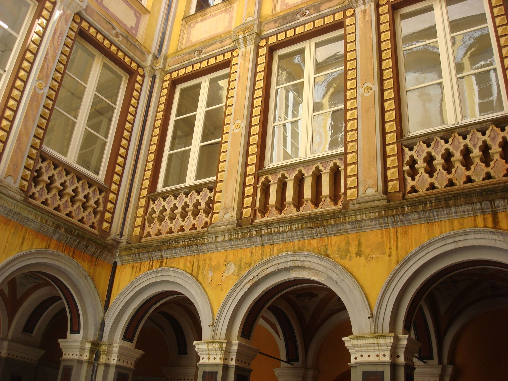 Patio del palazzo della Direzione della Miniera di Montevecchio, edificato tra il 1870 e il 1877 da Giovanni Antonio Sanna, visto dal basso.